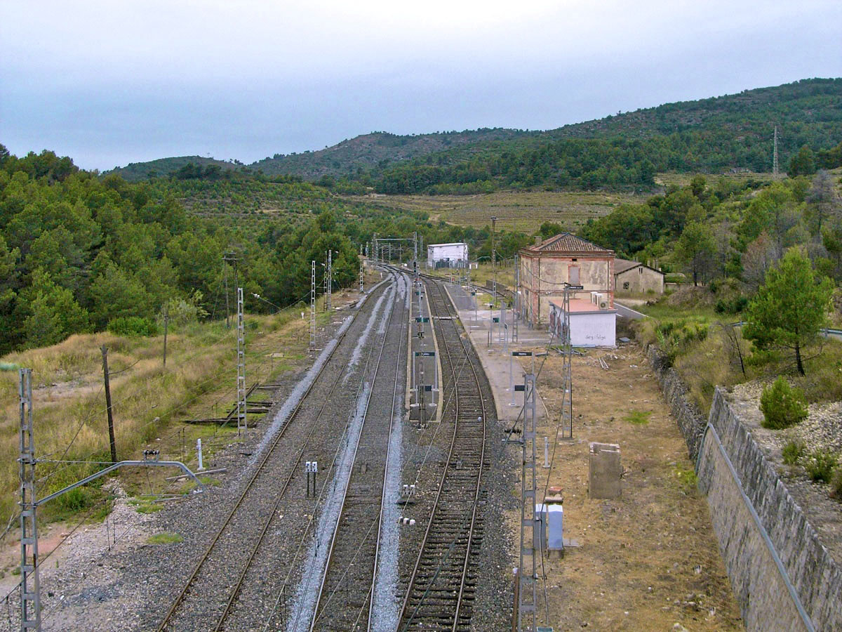 Vista general de la estación